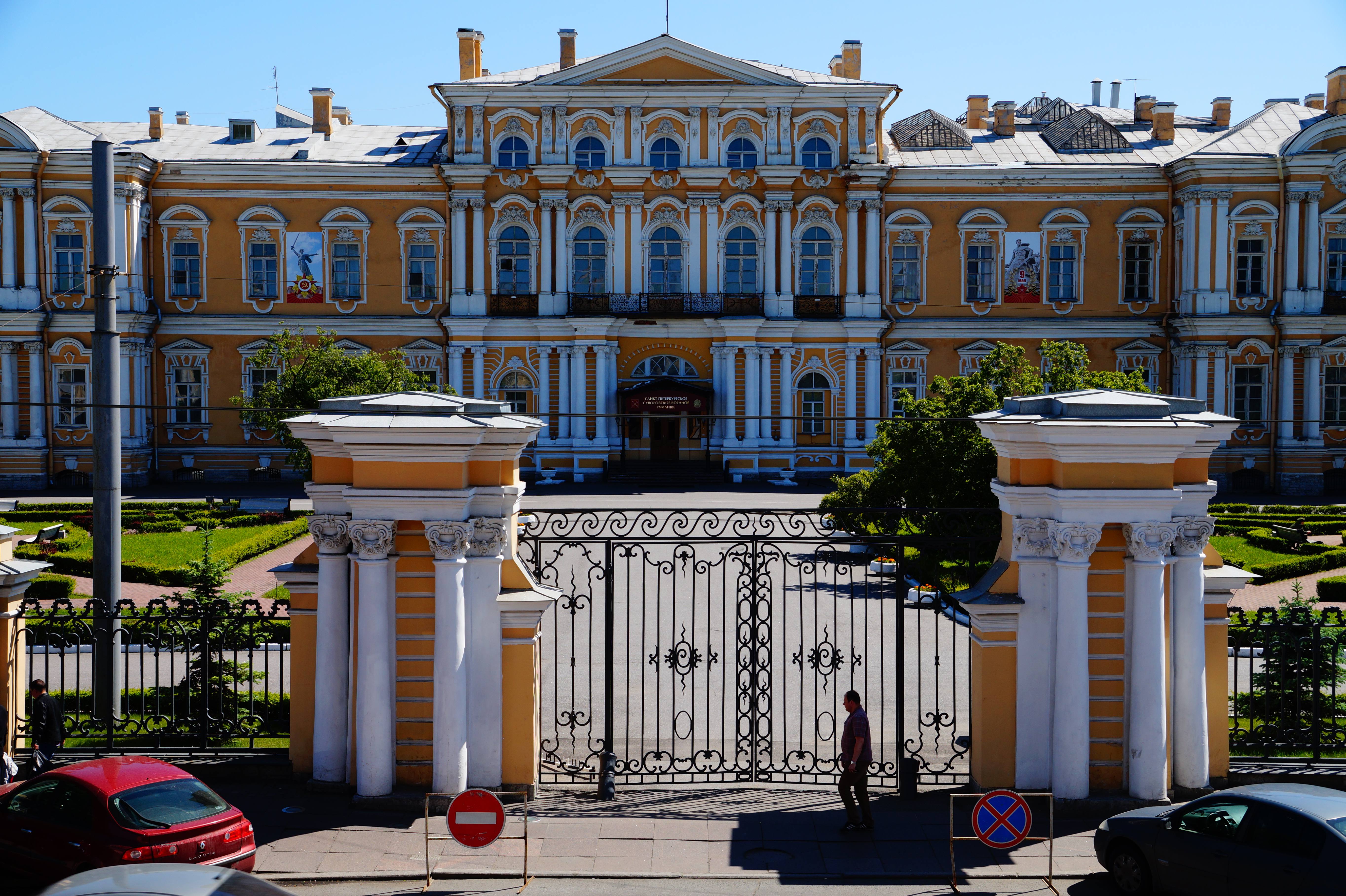 Сад: Садовая улица, 26, Центральный район, Санкт-Петербург